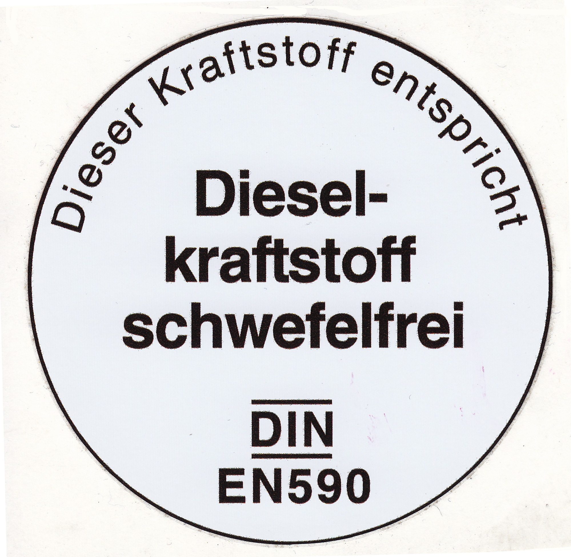 DK DIN EN 590 Zapfsäulenaufkleber nach § 13 der Zehnten Verordnung zur Durchführung des Bundes-Immissionsschutzgesetzes (10. BImSchV)